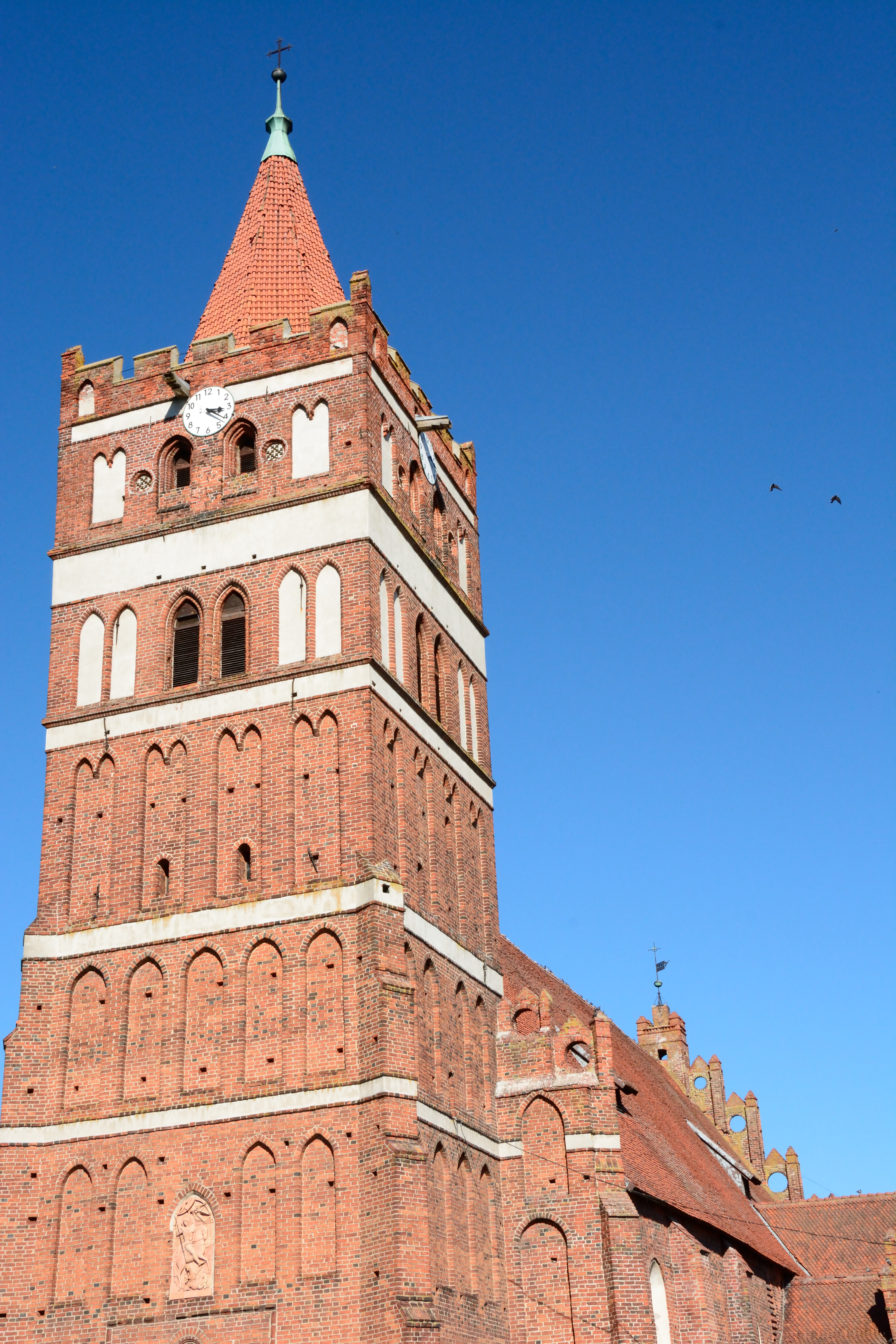 Pravdinsk, Kaliningrad Oblast, Russia, 238400